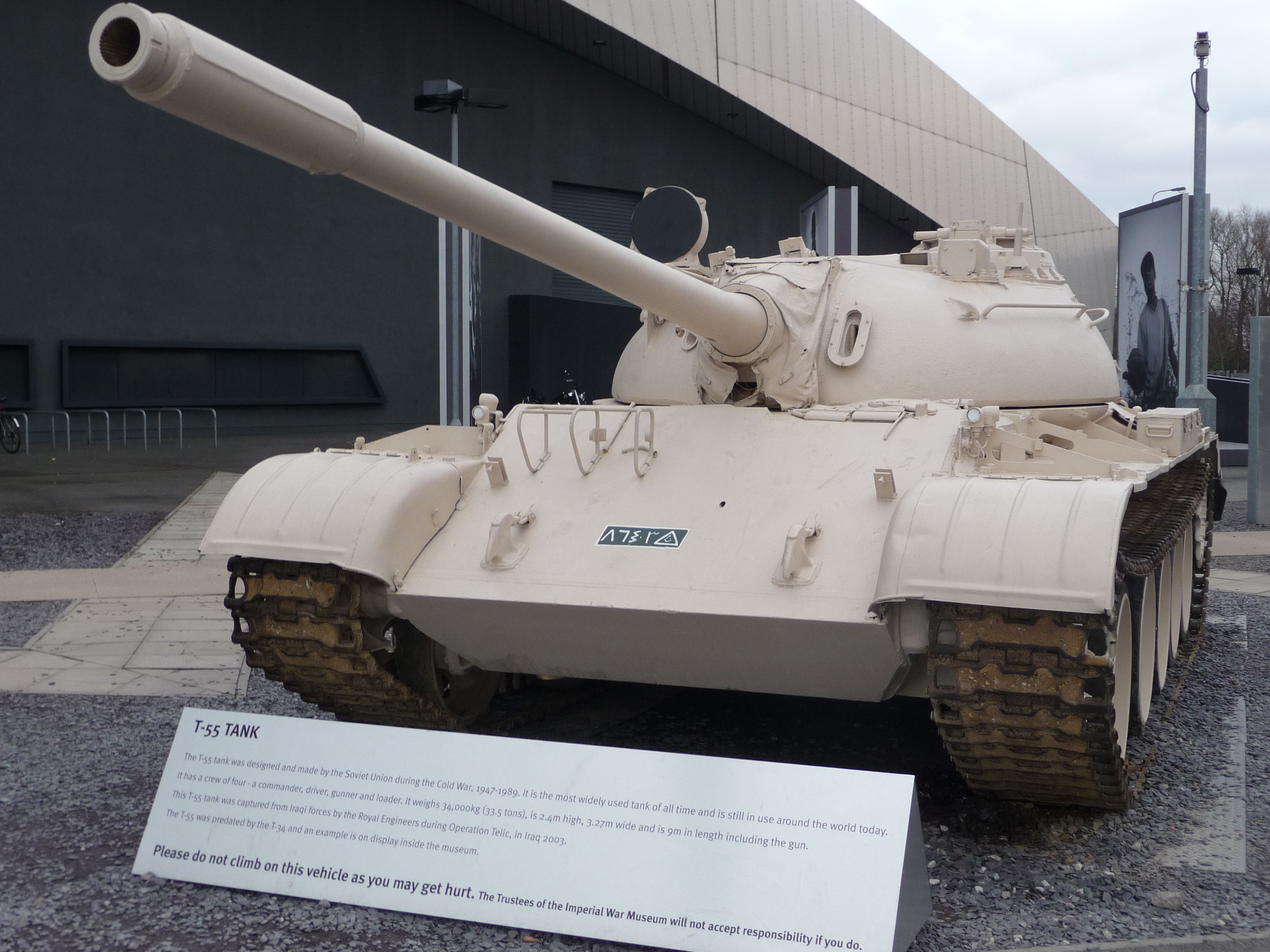 T-55 Tank